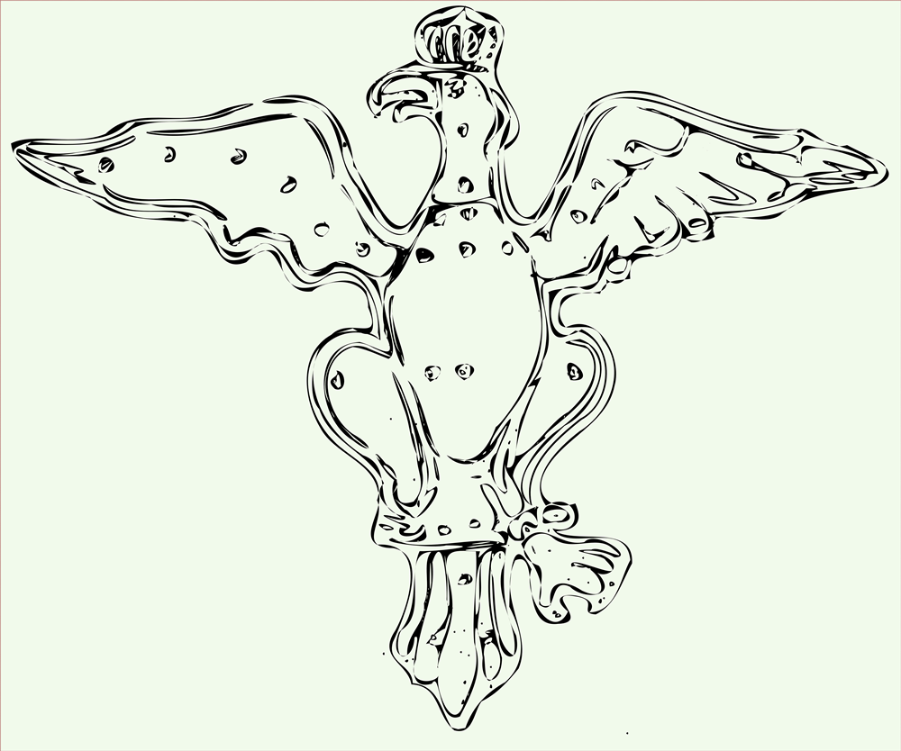 Orzeł z wieży Ratusza w Poznaniu - stan po odnalezieniu w roku 1945